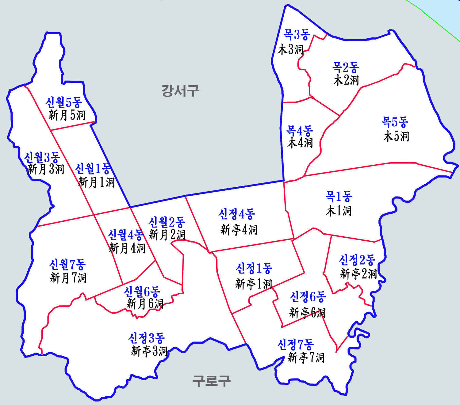 서울시 양천구 행정구역도